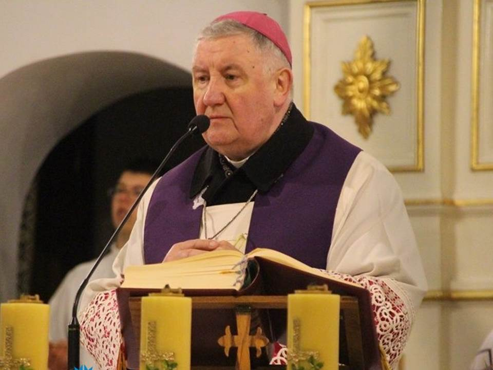 Romuald Kamiński w konkatedrze św. Aleksandra w Suwałkach podczas nabożeństwa drogi krzyżowej ulicami Suwałk